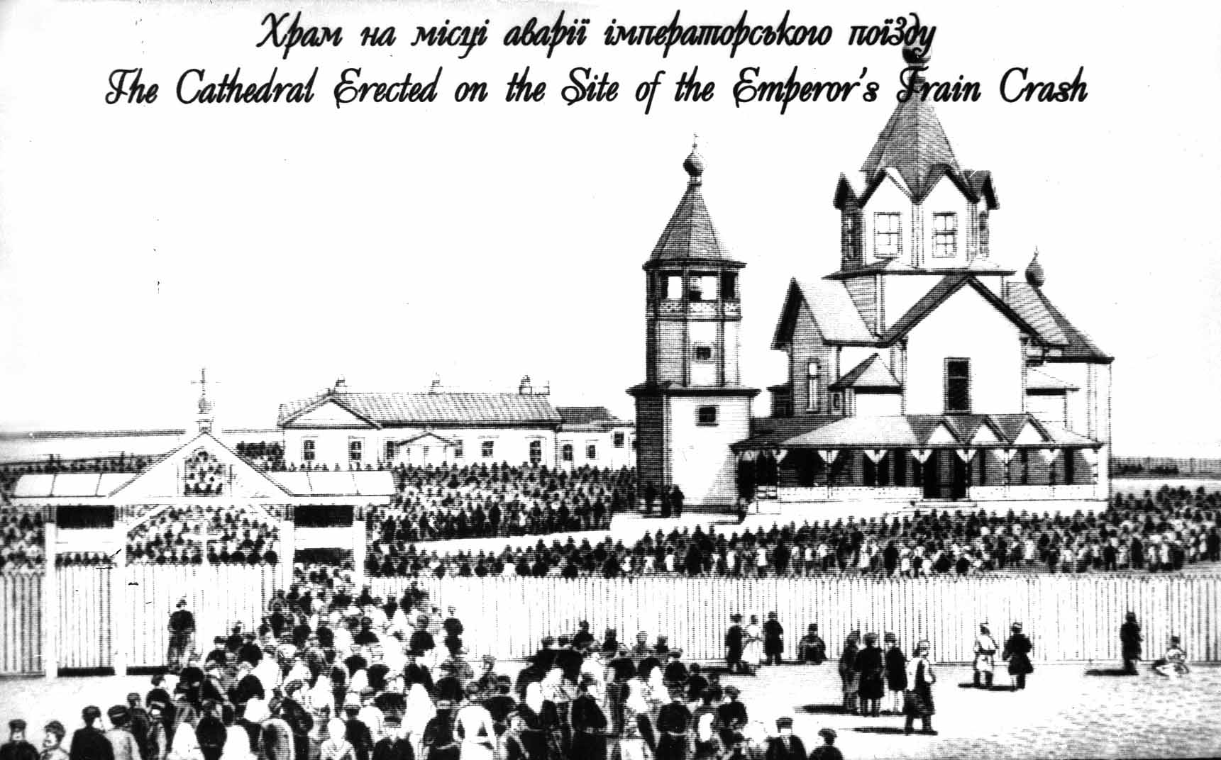 Православный деревянный храм в Борках на месте катастрофы царского поезда Александра Третьего 17 октября 1888 года. Первый по счёту храм (сейчас третий). До 1894 года.